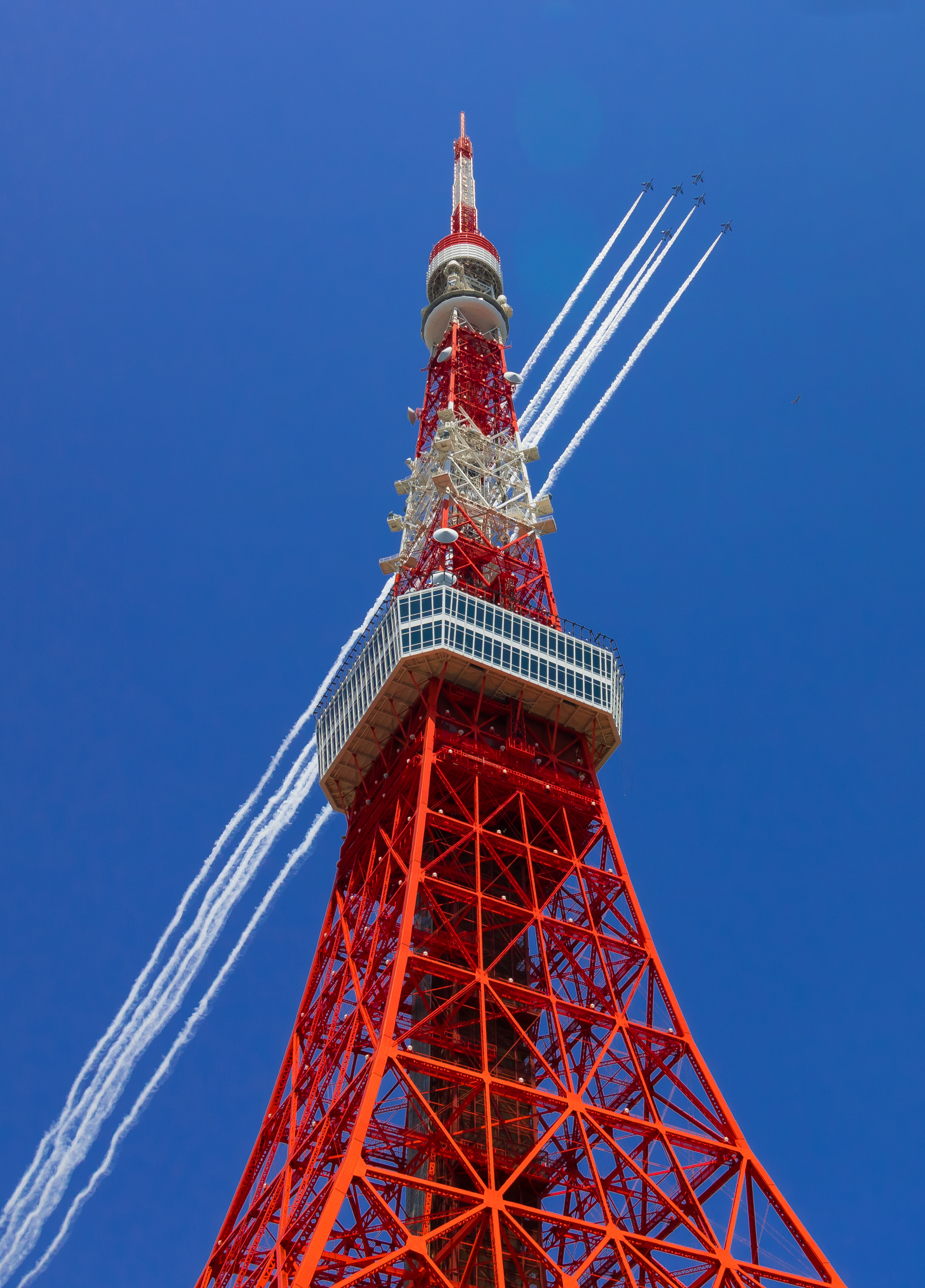 新型コロナにより医療関係者に感謝の意を示すために都心を飛行するブルーインパルス（2020.5）。